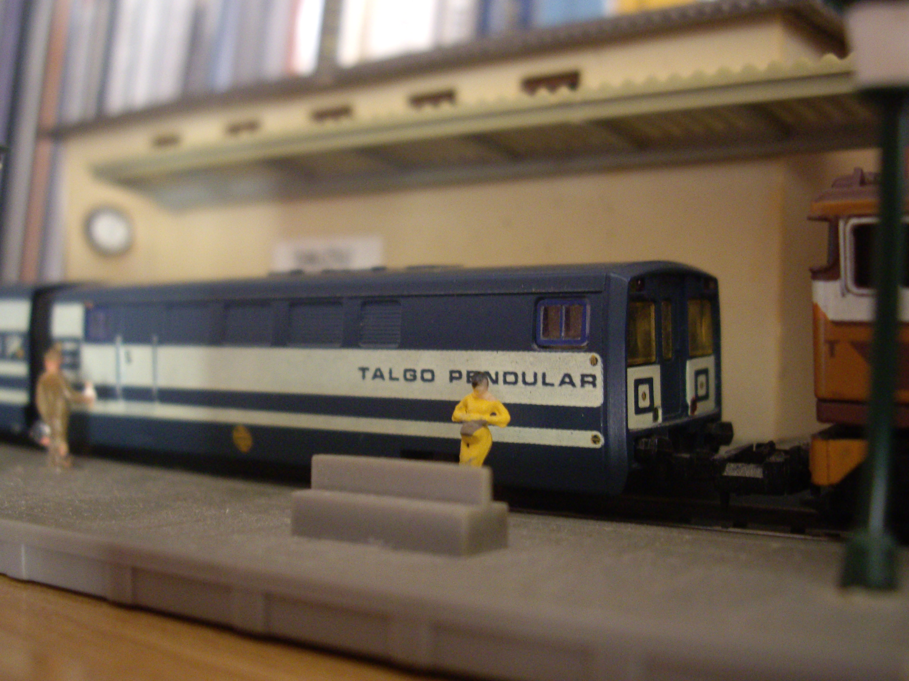 Maqueta con estación, andén y furgón demTalgo Pendular de RENFE de IBERTREN